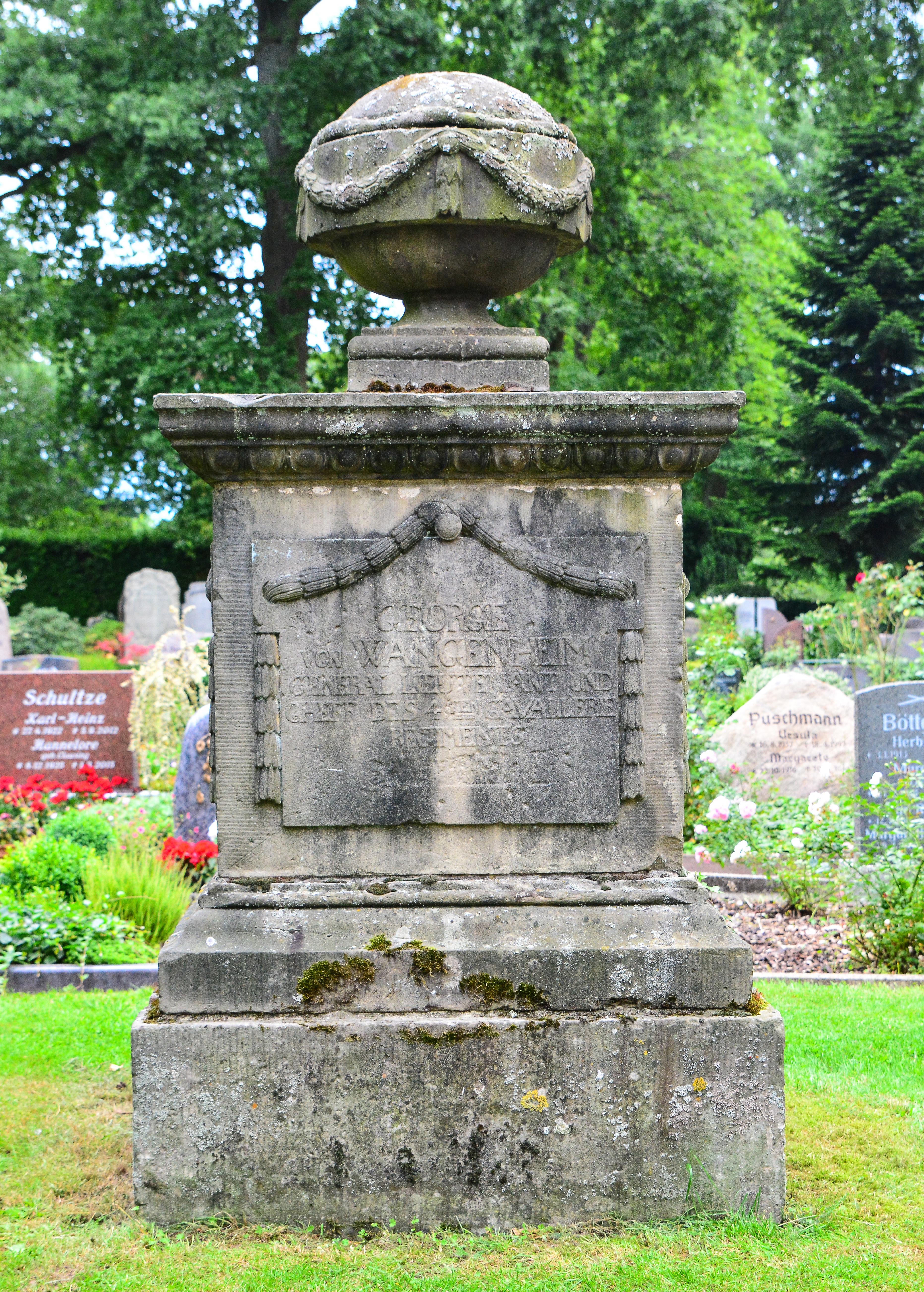 Historischer Grabstein George von Wangenheim auf dem Friedhof Saarstr. in Walsrode